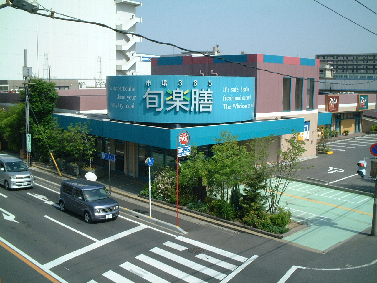 旬楽膳一宮八幡店の画像